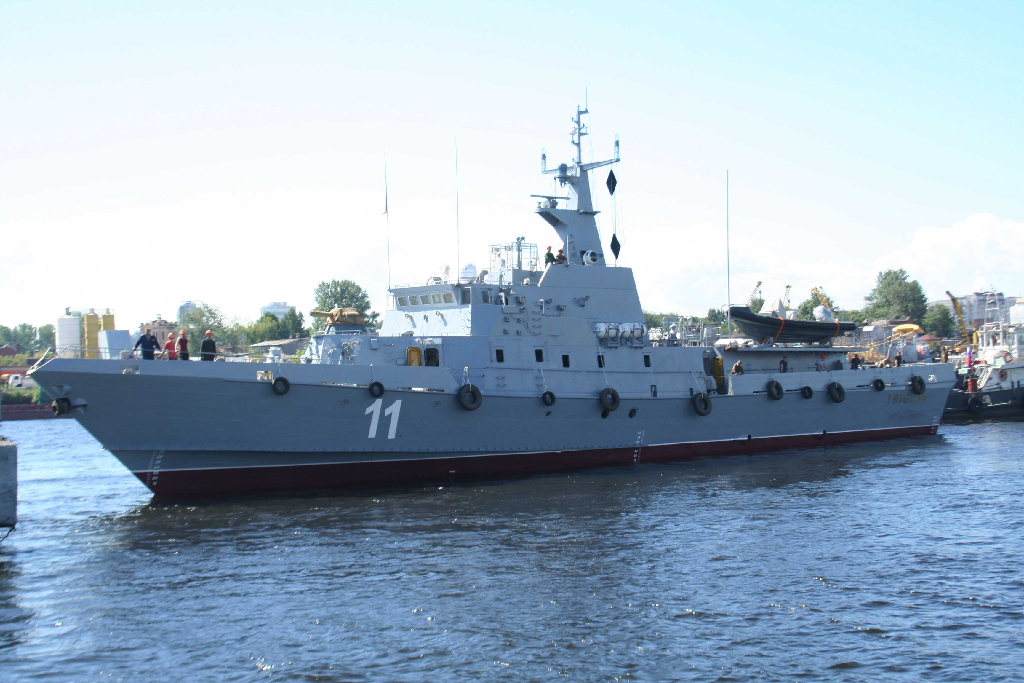 Patrol boat Triglav.